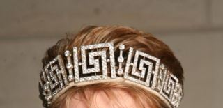 Care aparținea Reginei-mama Elena